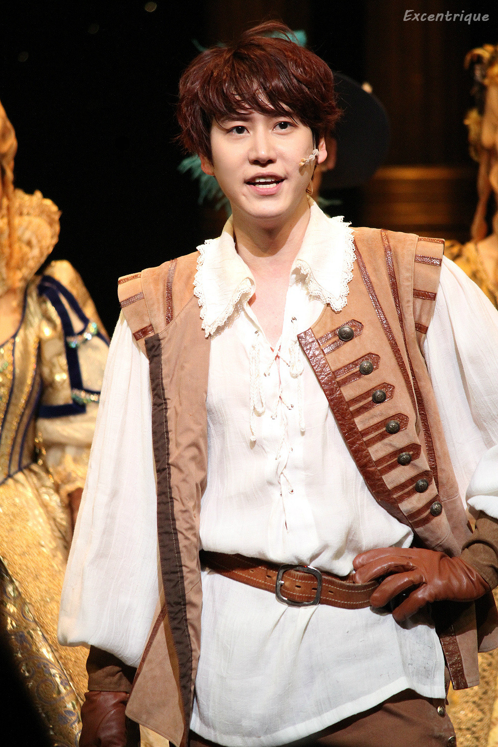 뮤지컬 삼총사 커튼콜